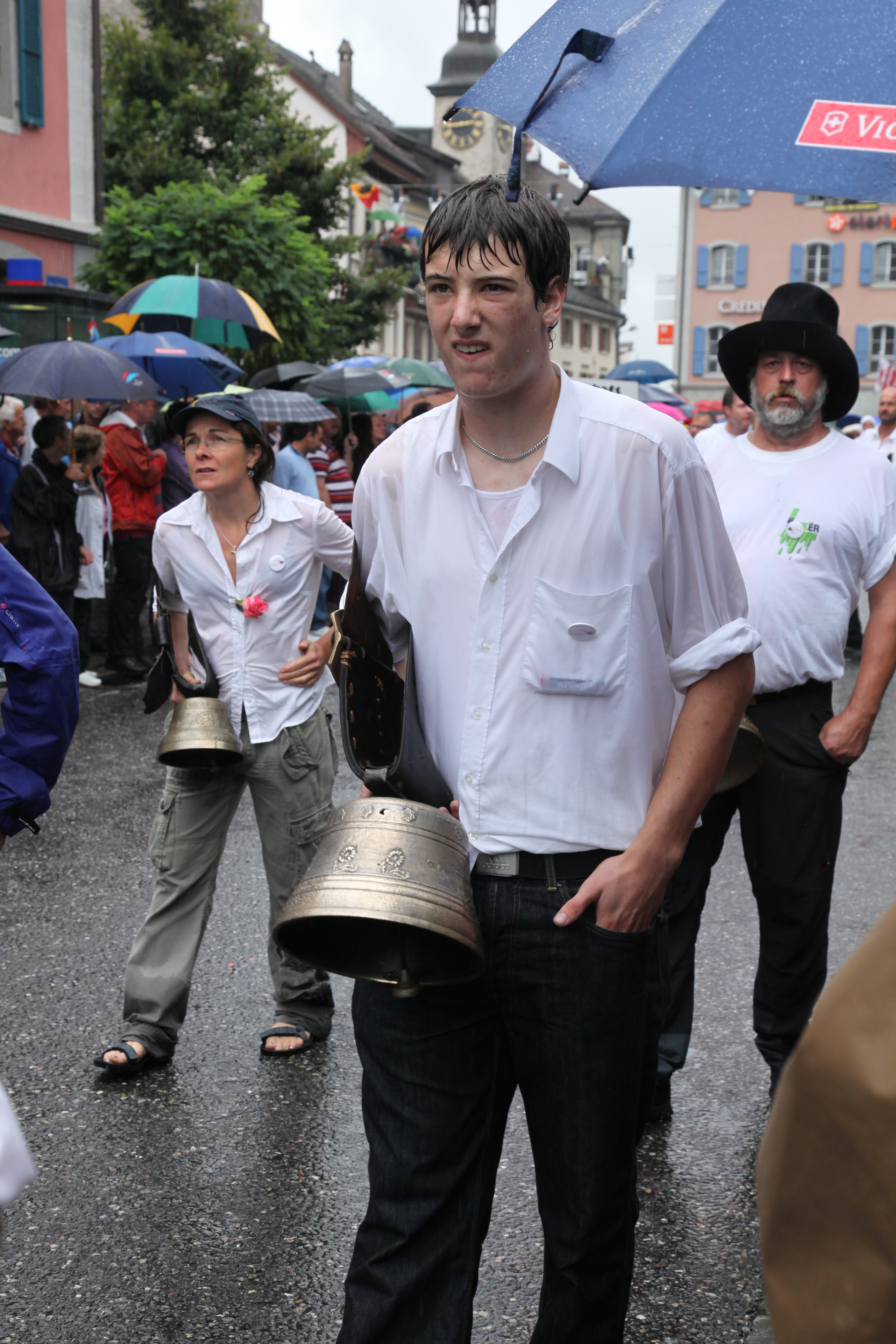 Instantanés de la Fête fédérale des sonneurs de cloches à Bulle (canton de Fribourg en Suisse). Le cortège du 4 septembre 2011. Photo: Pierre Schwaller